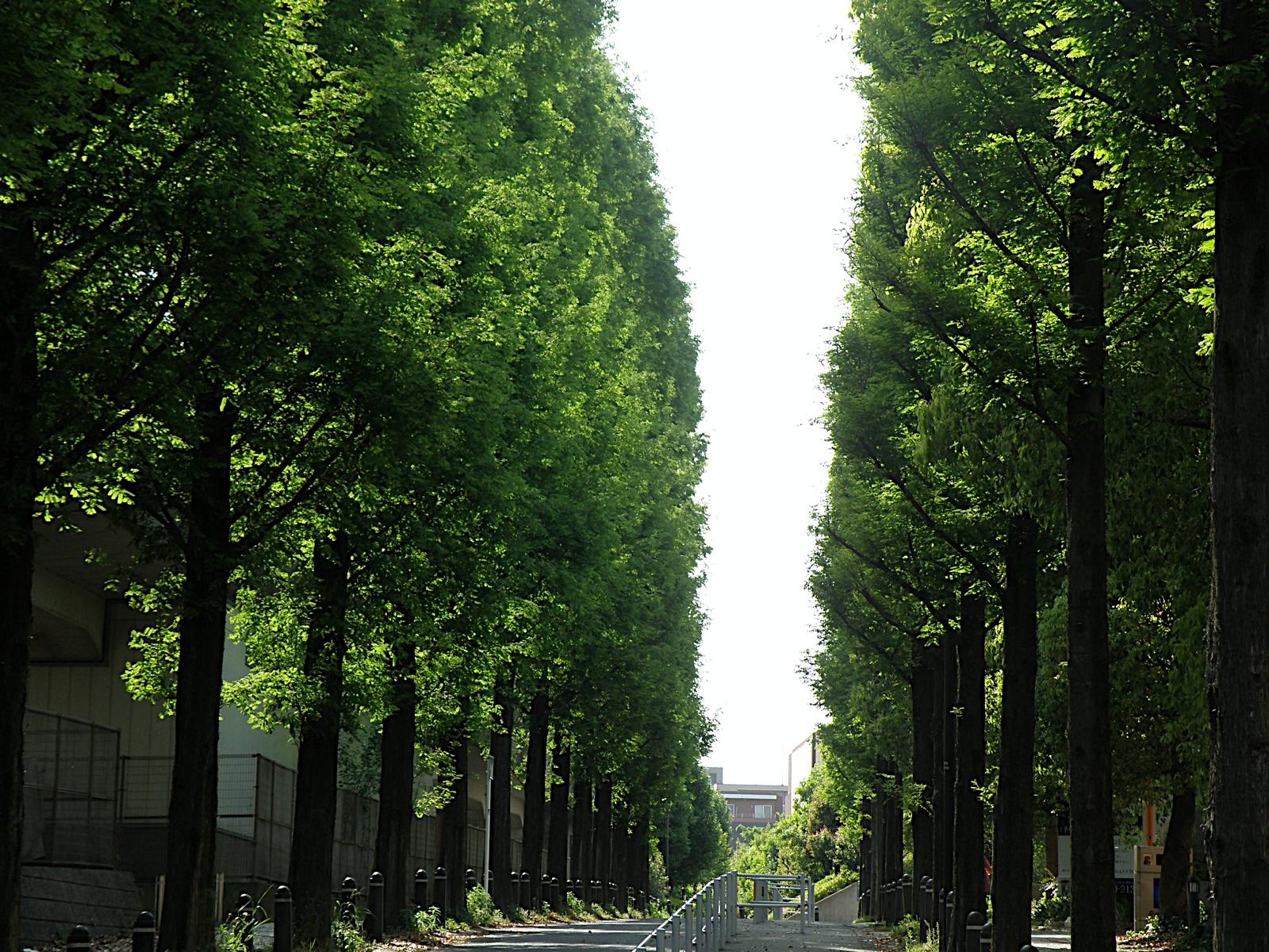 仲町台並木道